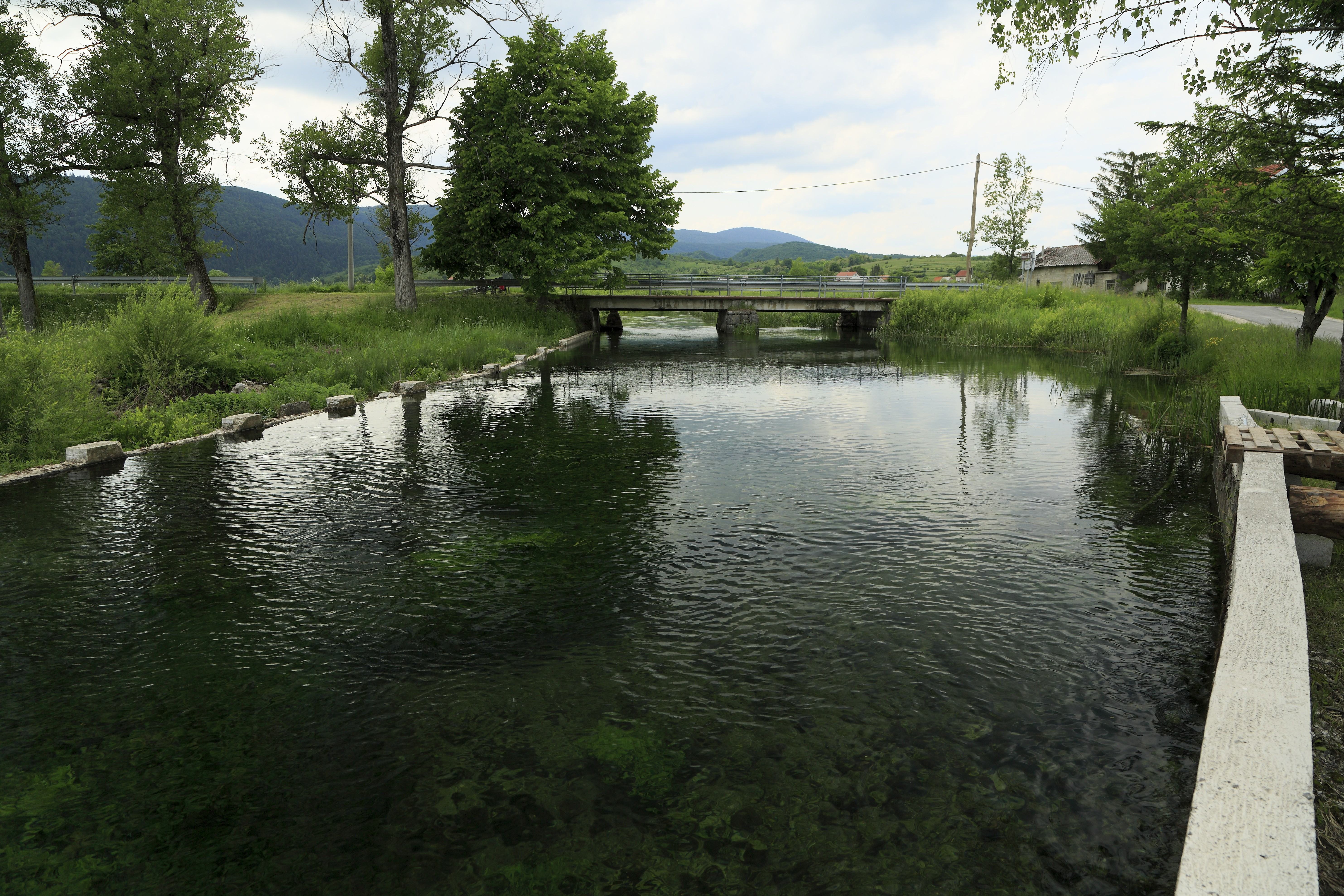 Von der Fischzuchtanstalt stromauf Richtung Westen, über die Brücke führt die Fernverkehrsstraße D42. Die Dretulja ist ein kleiner Karstfluss, der knapp zwei Kilometer westlich von Plaški in einem Quellteich entspringt und ebenfalls zwei Kilometer östlich von Plaški wieder versickert. Die Dretulja ist hier für die Versorgung der Fischzuchtanstalt aufgestaut, links liegt der Überlauf.